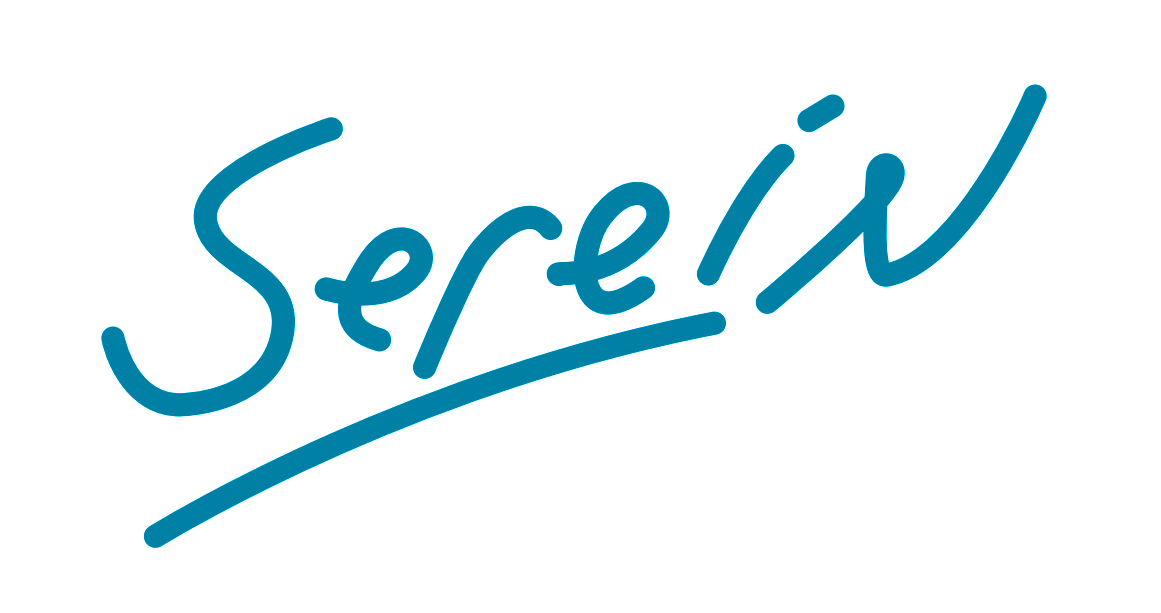 Американская кинокомпания SEREIN. 2018 г